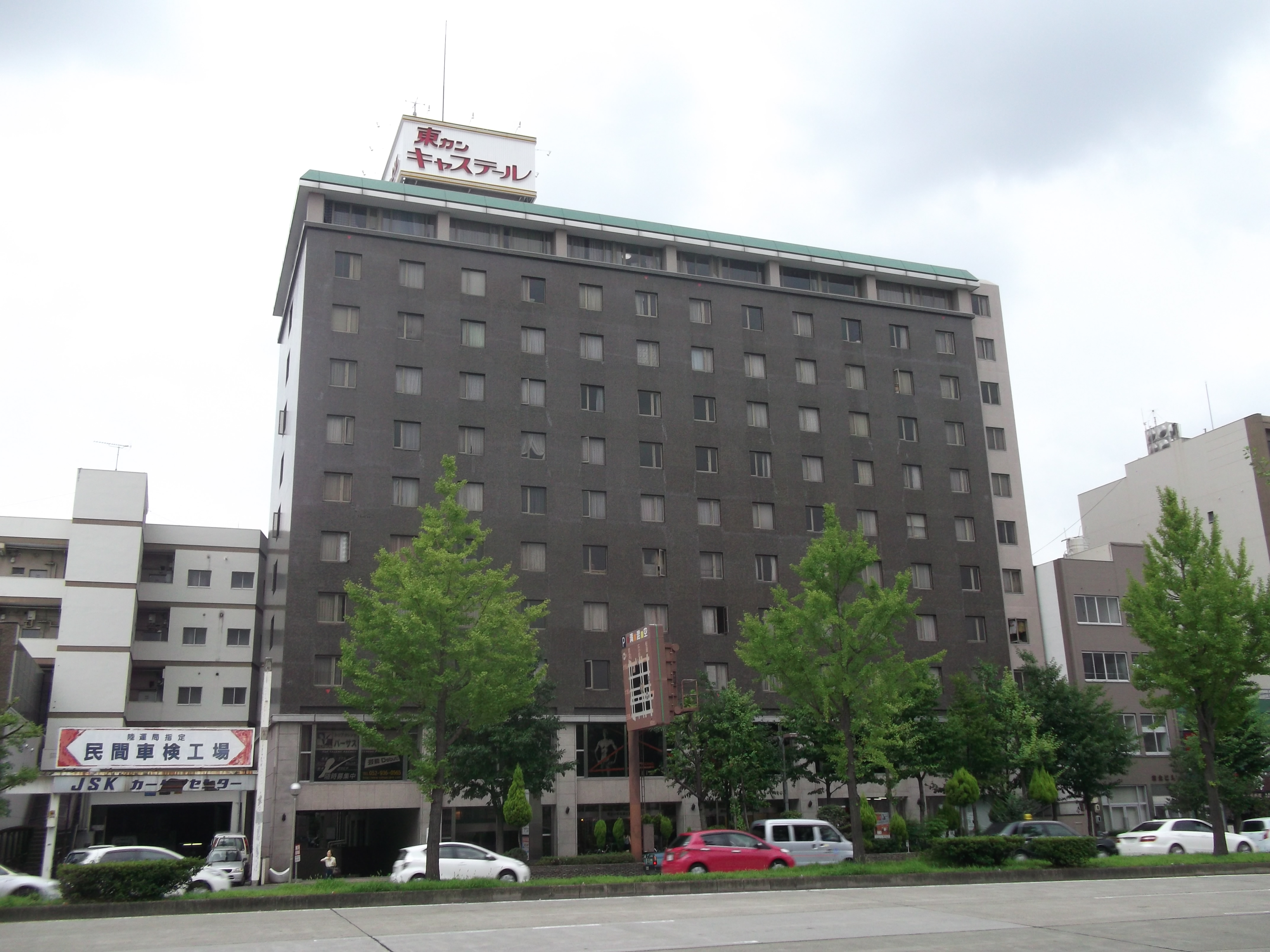 名古屋市東区東桜の東カンキャステルを北側公道より撮影